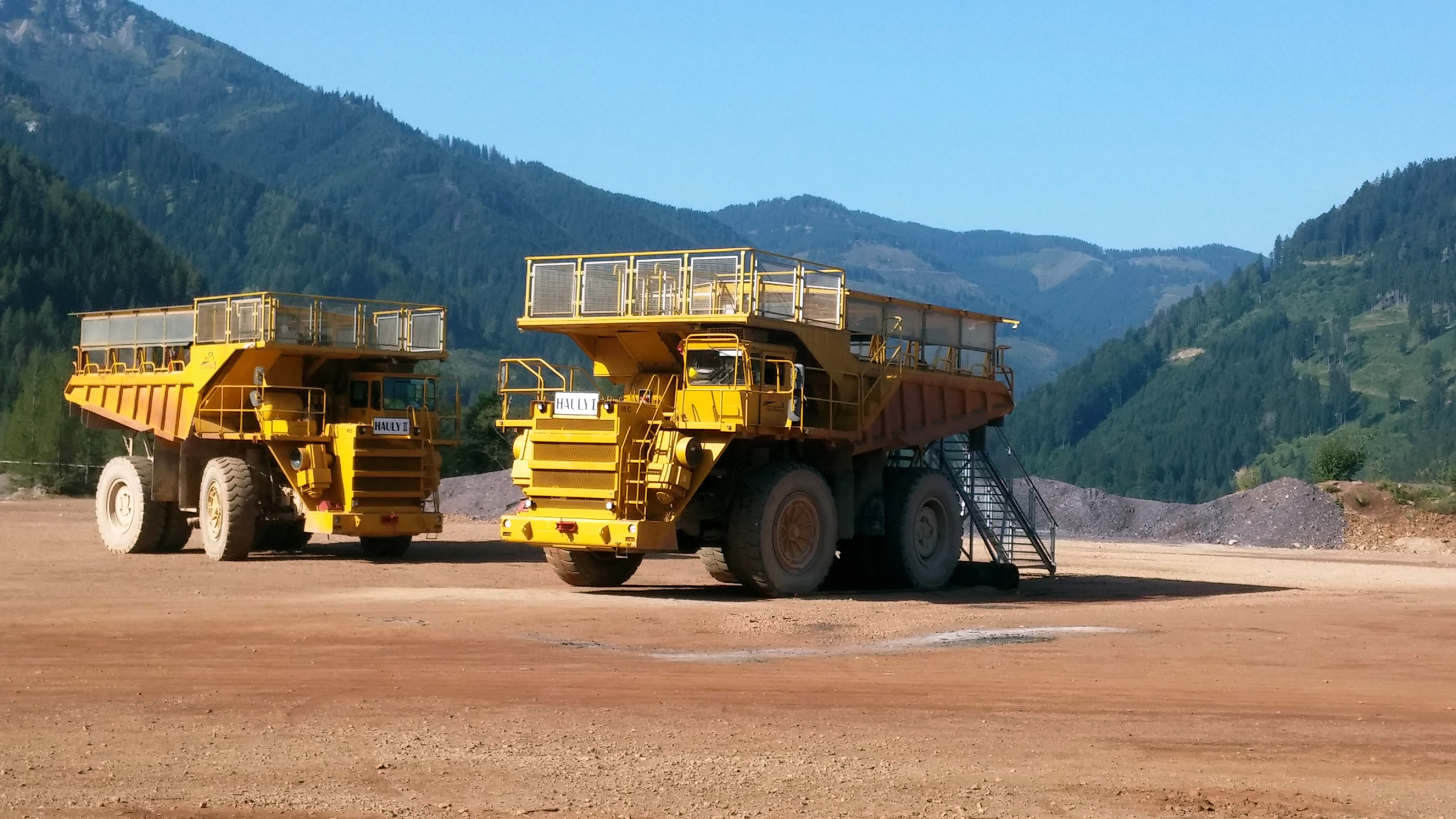 Erzberg: für den Besuchertransport umgebaute Schwer-Lastkraftwagen